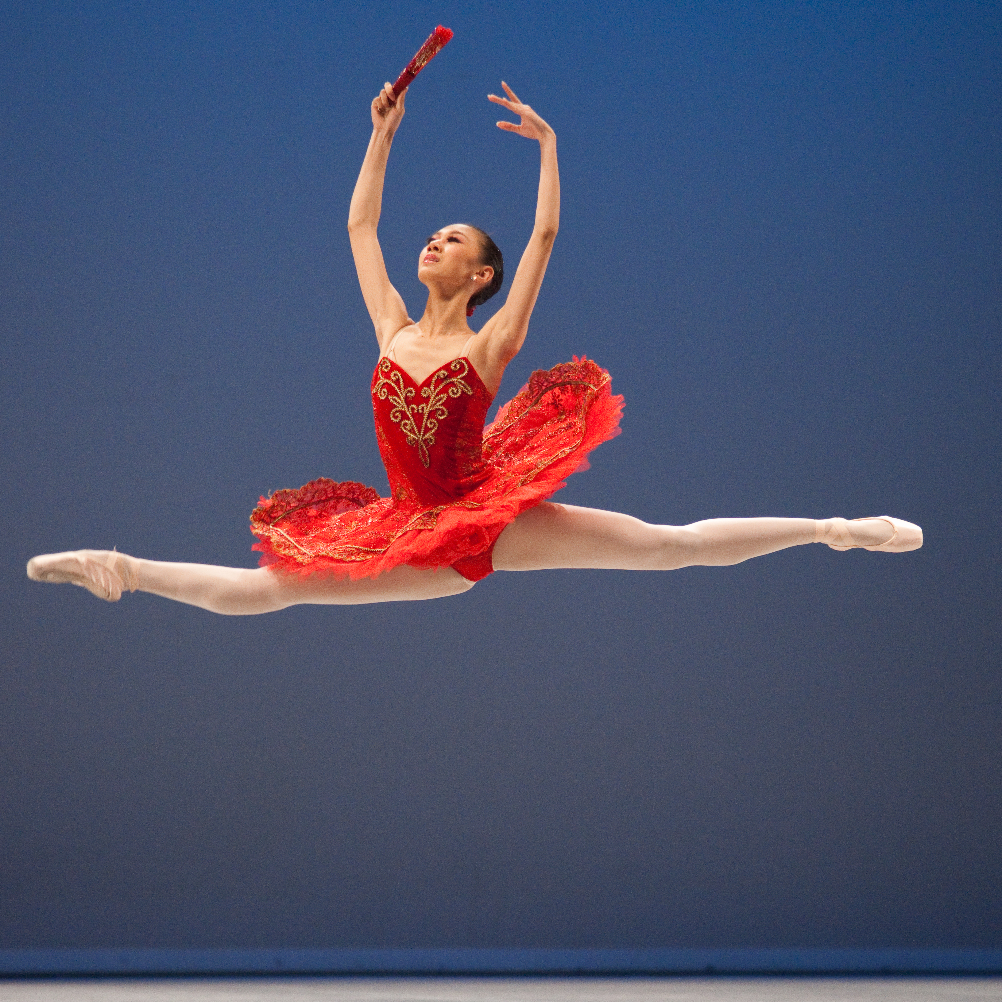 Variation extraite de Don Quichotte au Prix de Lausanne 2010. The making of this document was supported by Wikimedia CH. (Submit your project!) For all the files concerned, please see the category Supported by Wikimedia CH.